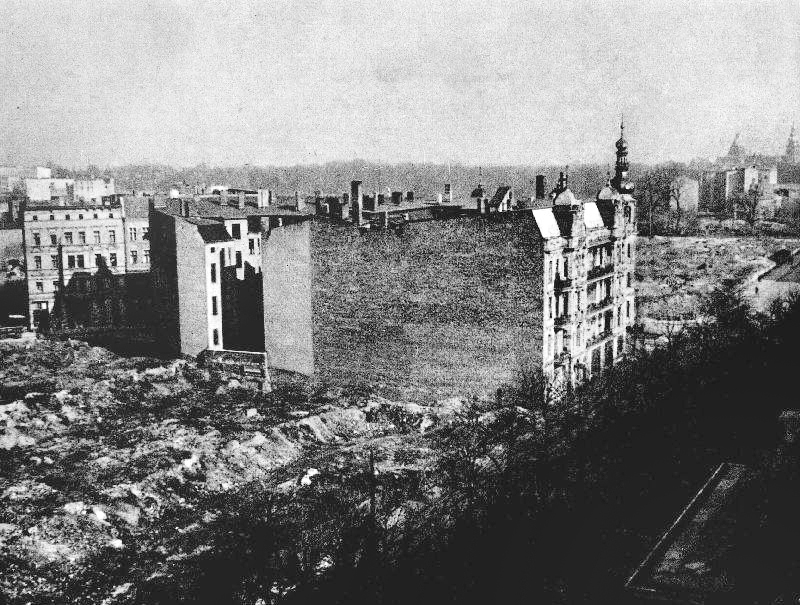 Kamienica przy ulicy Mariana Buczka 7 w Szczecinie (dziś przy ul. Piłsudskiego 7).